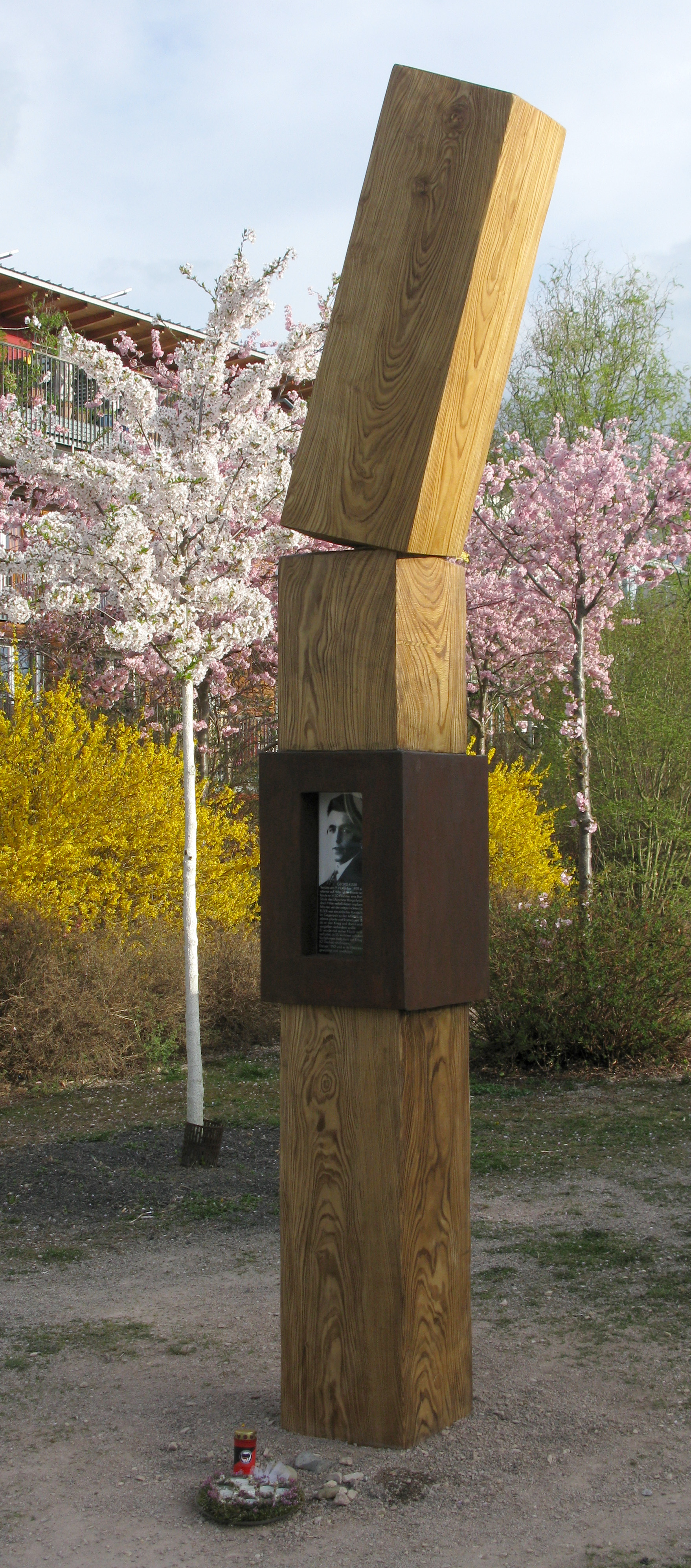 Denkmal für Georg Elser in Freiburg-Vauban nahe der Georg-Elser-Straße; Robinienholz + Eisen, Clemens Hunger (2015)